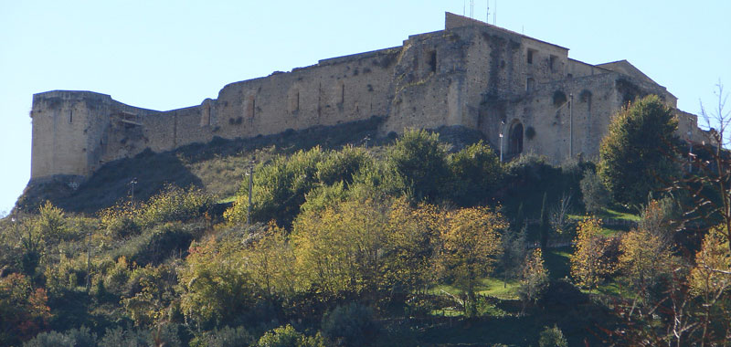 Cosenza. Castello Normanno-Svevo